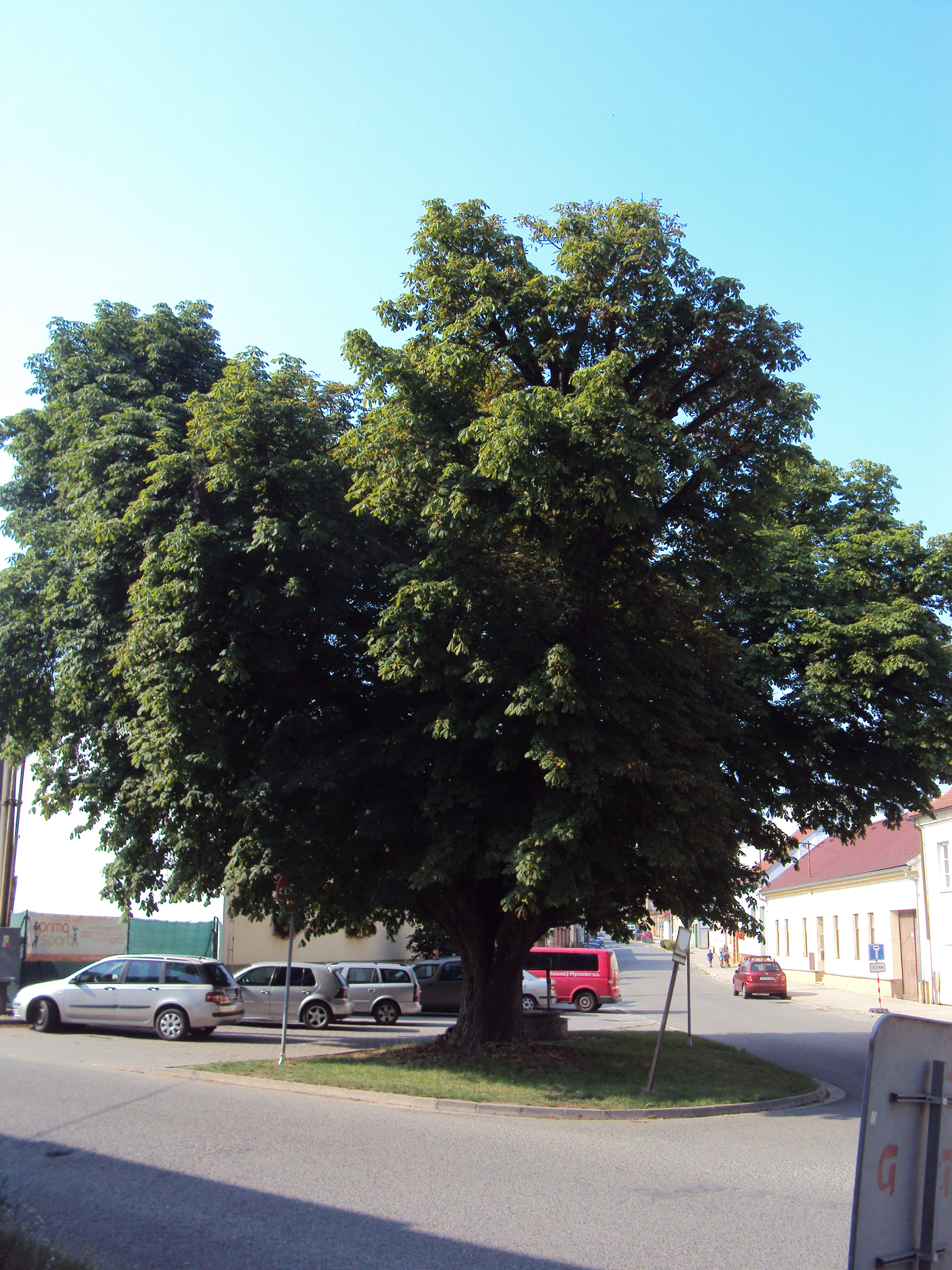 Chráněný jírovec u pošty, Veverská Bítýška